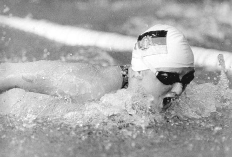 Ines Geißler ADN-ZB Kluge 25.5.84 Magdeburg: 35. DDR-Schwimm-Meisterschaften- DDR-Meisterin über 100 m Schmetterling wurde Ines Geißler (SC Karl-Marx-Stadt) in 59,88s. Die Europameisterin gewann vor der Magdeburgerin Kathleen Nord un der Rostockerin Susanne Link.